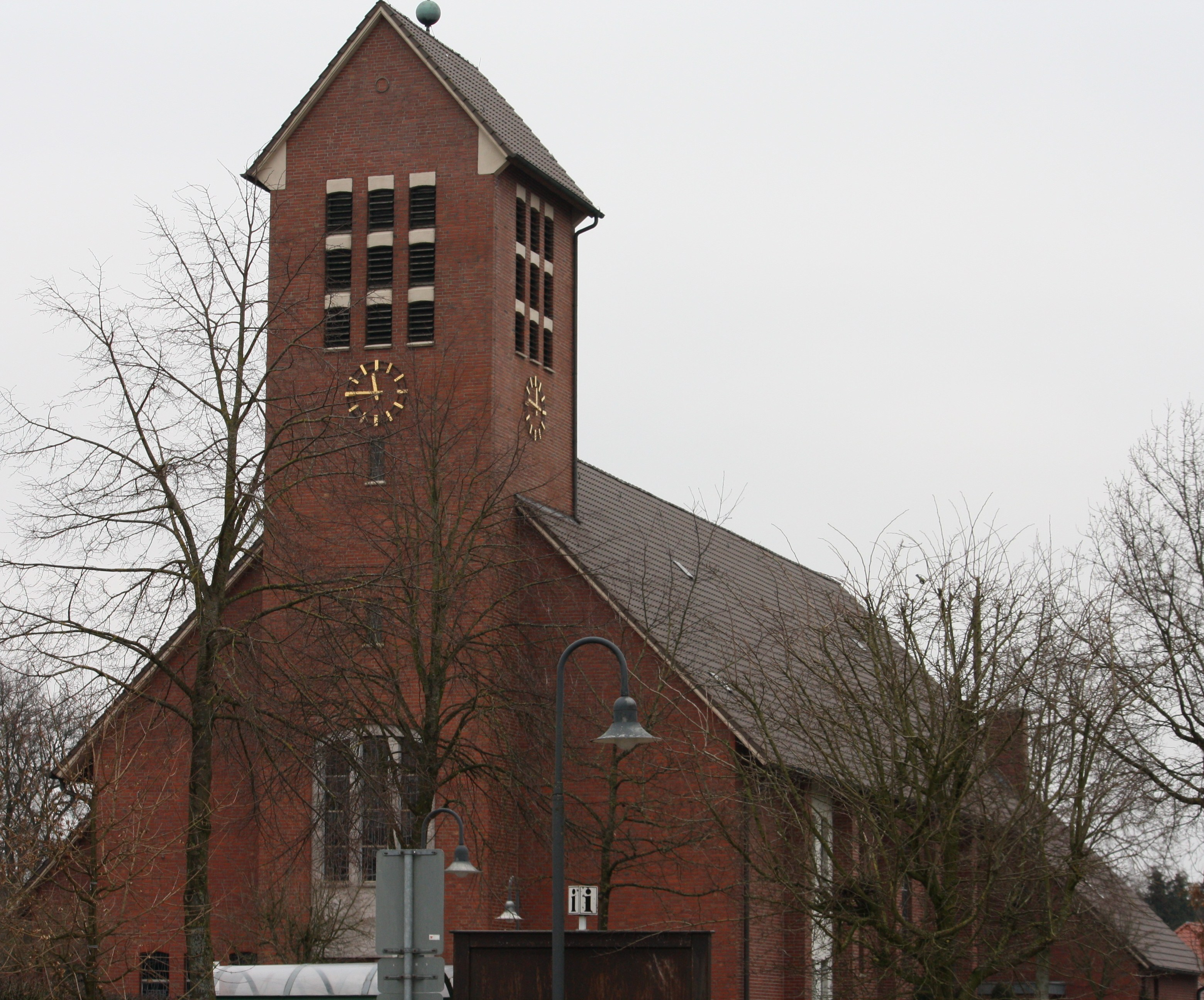 Ortskirche St.Bonifatius in Altenberge Kreis Emsland